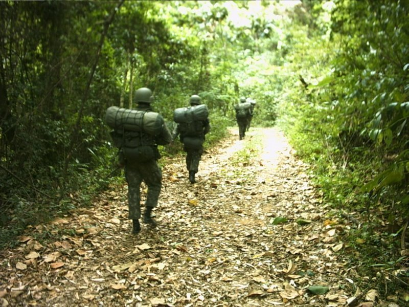 Campo do Período Básico CFS